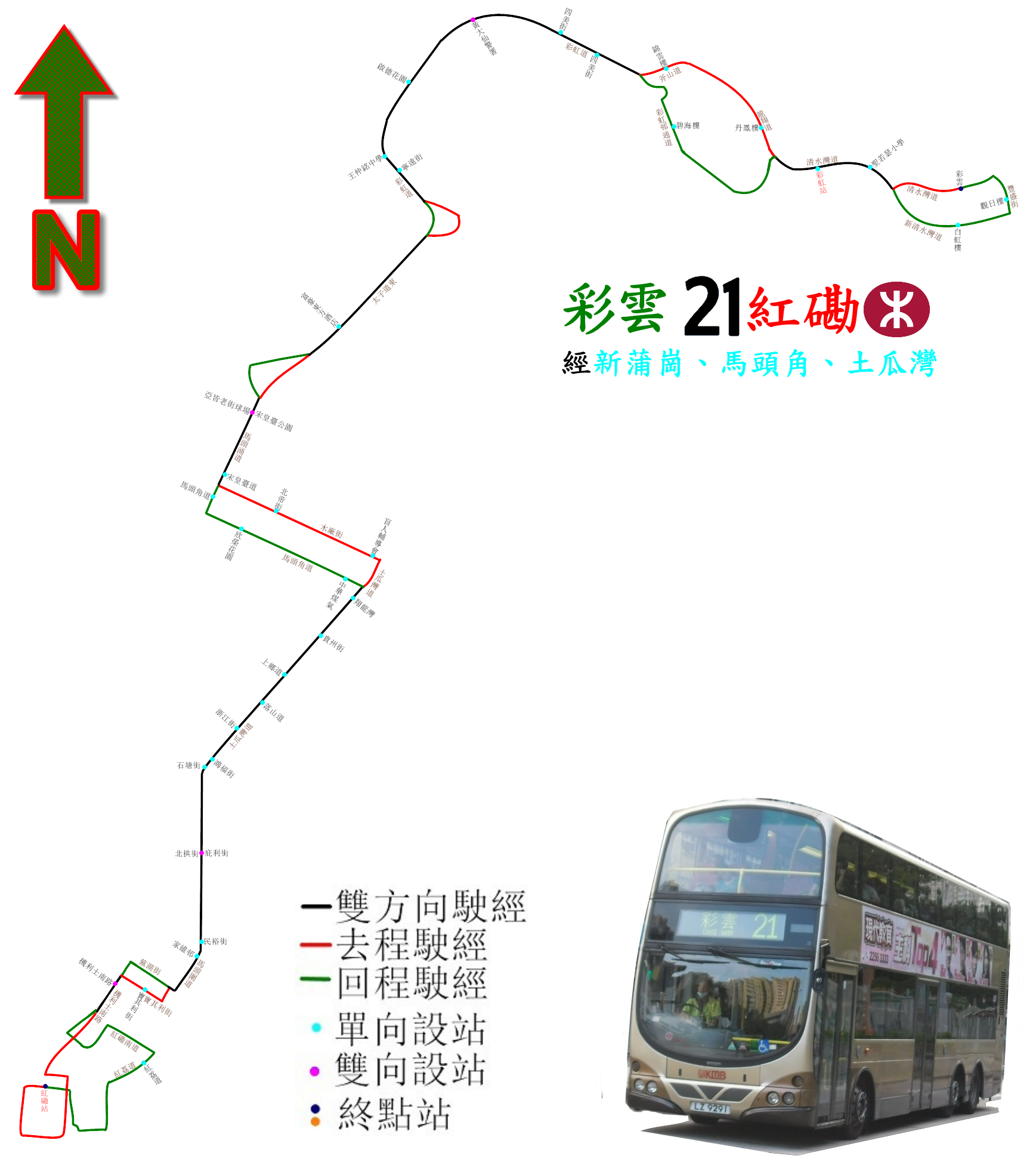 中文（香港）: 九巴21線的走線圖